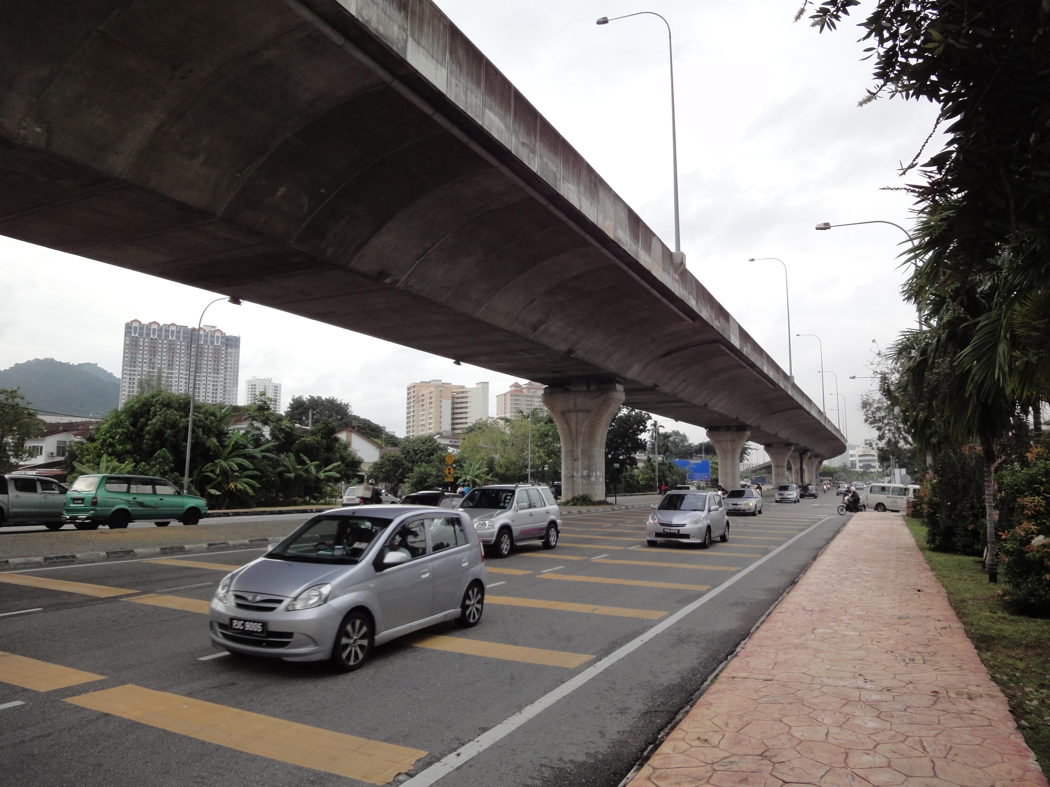 Jalan Sultan Azlan Shah